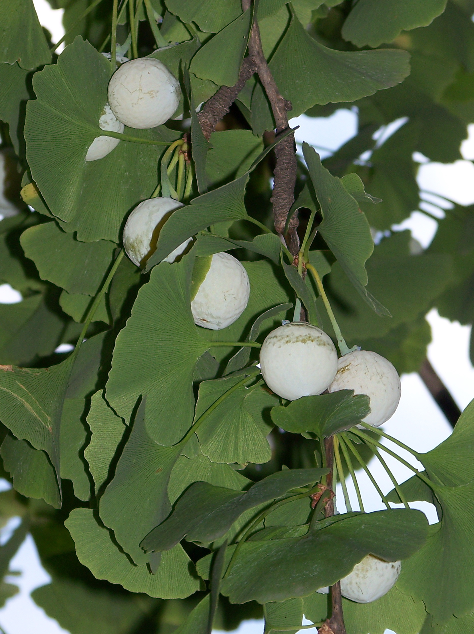 Ginkgo biloba : Falsos frutos inmaduros in situ - Parque del Oueste, Paseo de Ruperto Chapi - Madrid (España).